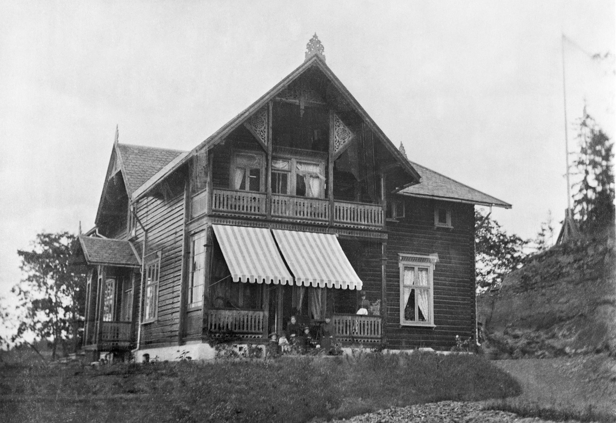 Karenslyst løkke, villa